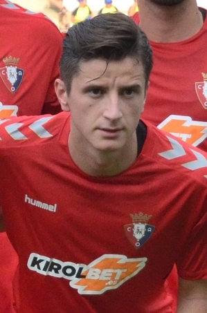 CSC_0149